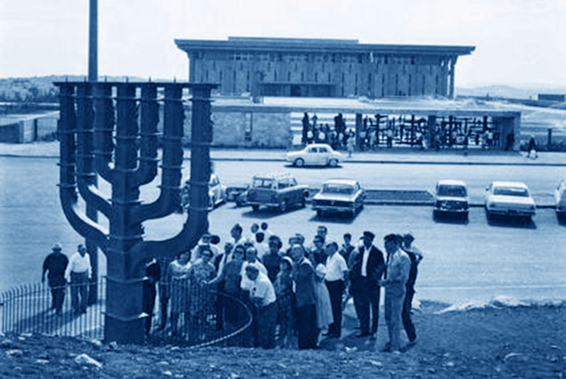 עיבוד לצילום של מנורת הכנסת במקומה החדש בגבעת רם, 1966